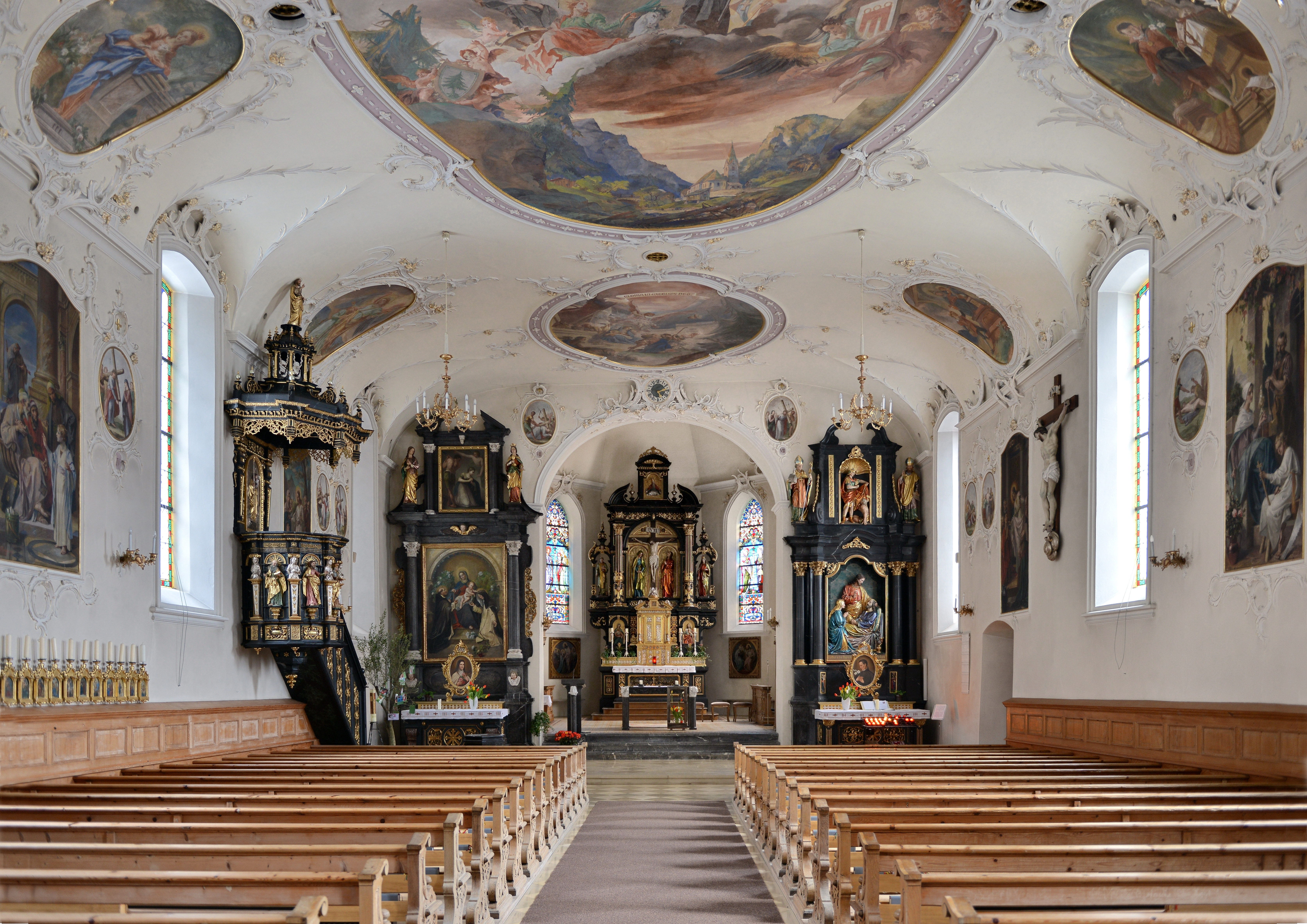 Pfarrkirche Hl. Leonhard in Au (Vorarlberg)